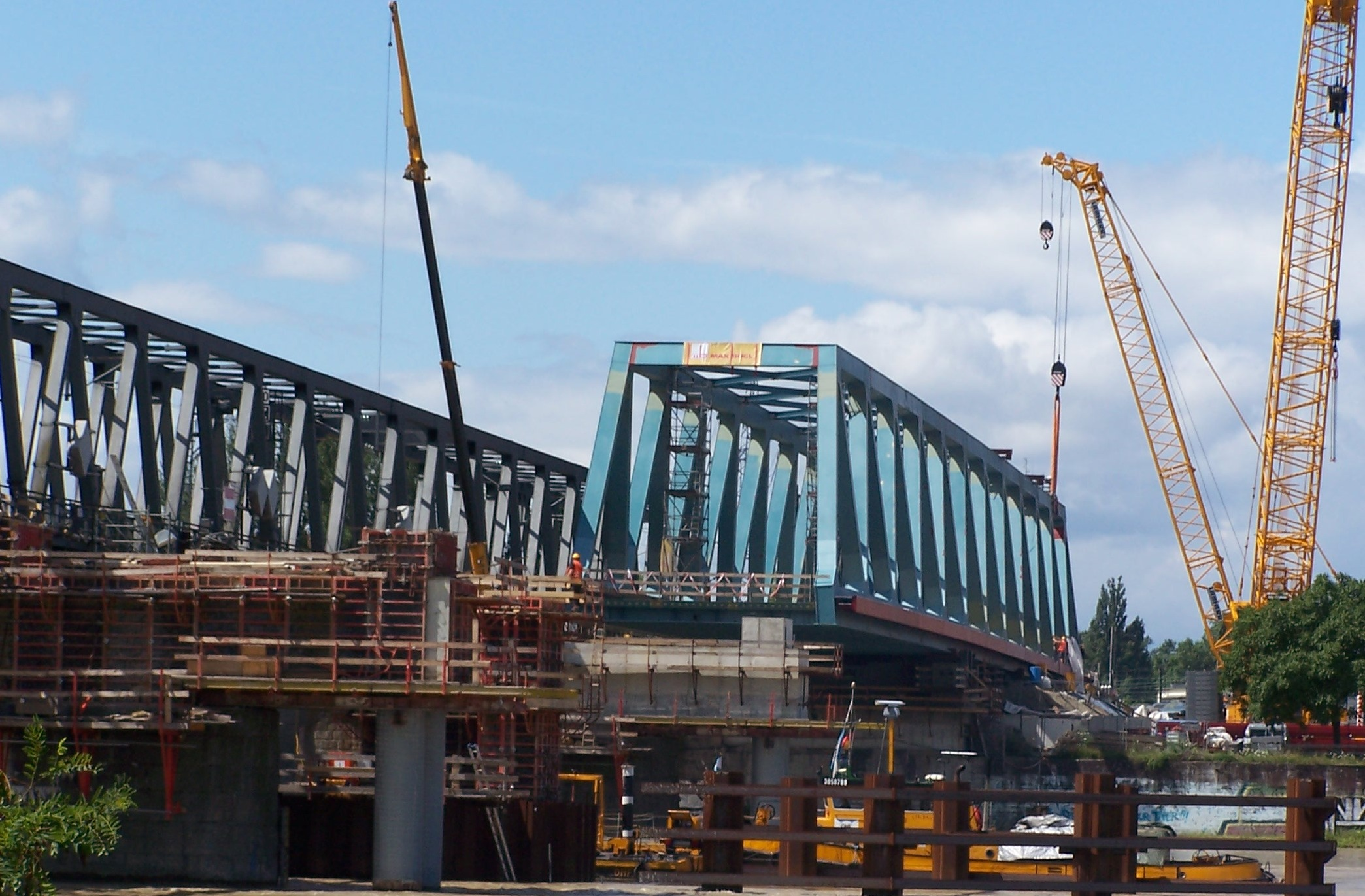 Bau der neuen Rheinbrücke in Kehl.